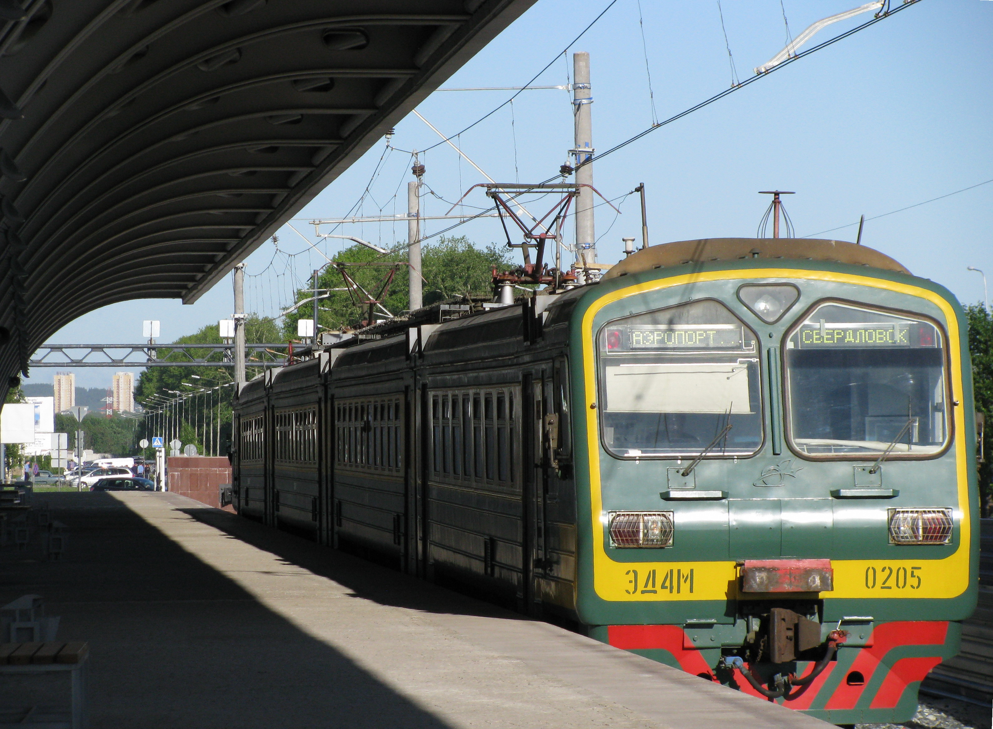 Городская электричка Свердловс-пассажирский - Аэропорт Кольцово. Екатеринбург, 2009